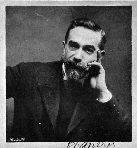 Retrato de Agustín Querol, obra del fotógrafo Kaulak, recogido en la revista española La Ilustración Española y Americana.